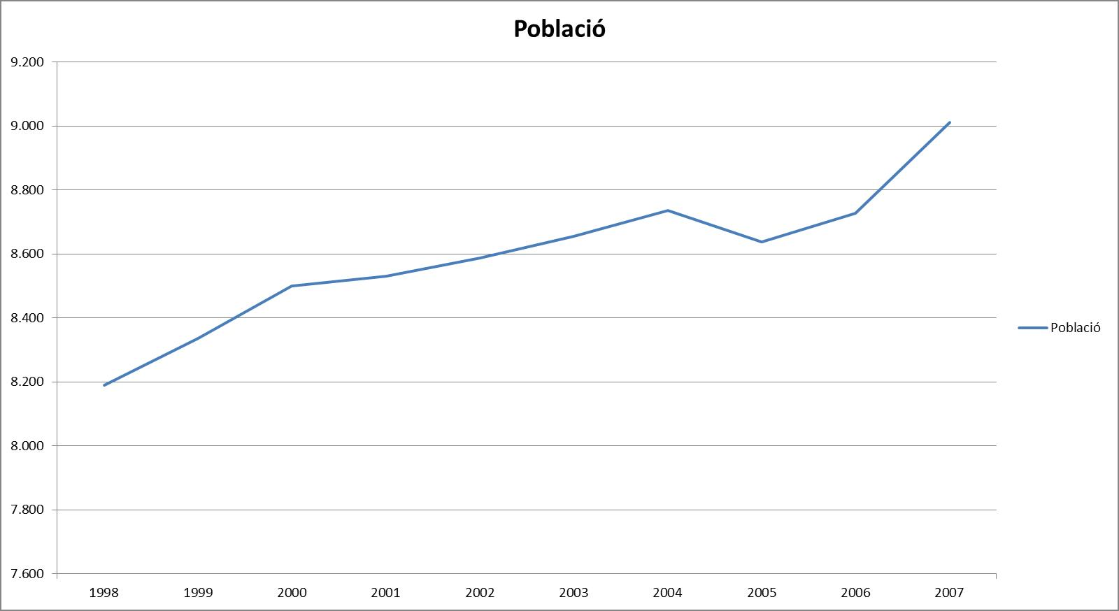 Gràfic on es visualitza l'evolució de la població